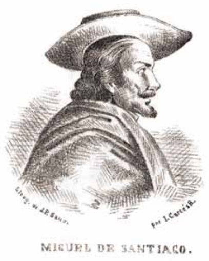 Supuesto retrato de MIguel de Santiago, en una litografía firmada por J. Garcés R. Aparece en el artículo autobiográfico de Juan León Mera, publicado el 20 de noviembre de 1861, en la revista El Iris Nº9, en la ciudad de Quito (Ecuador).